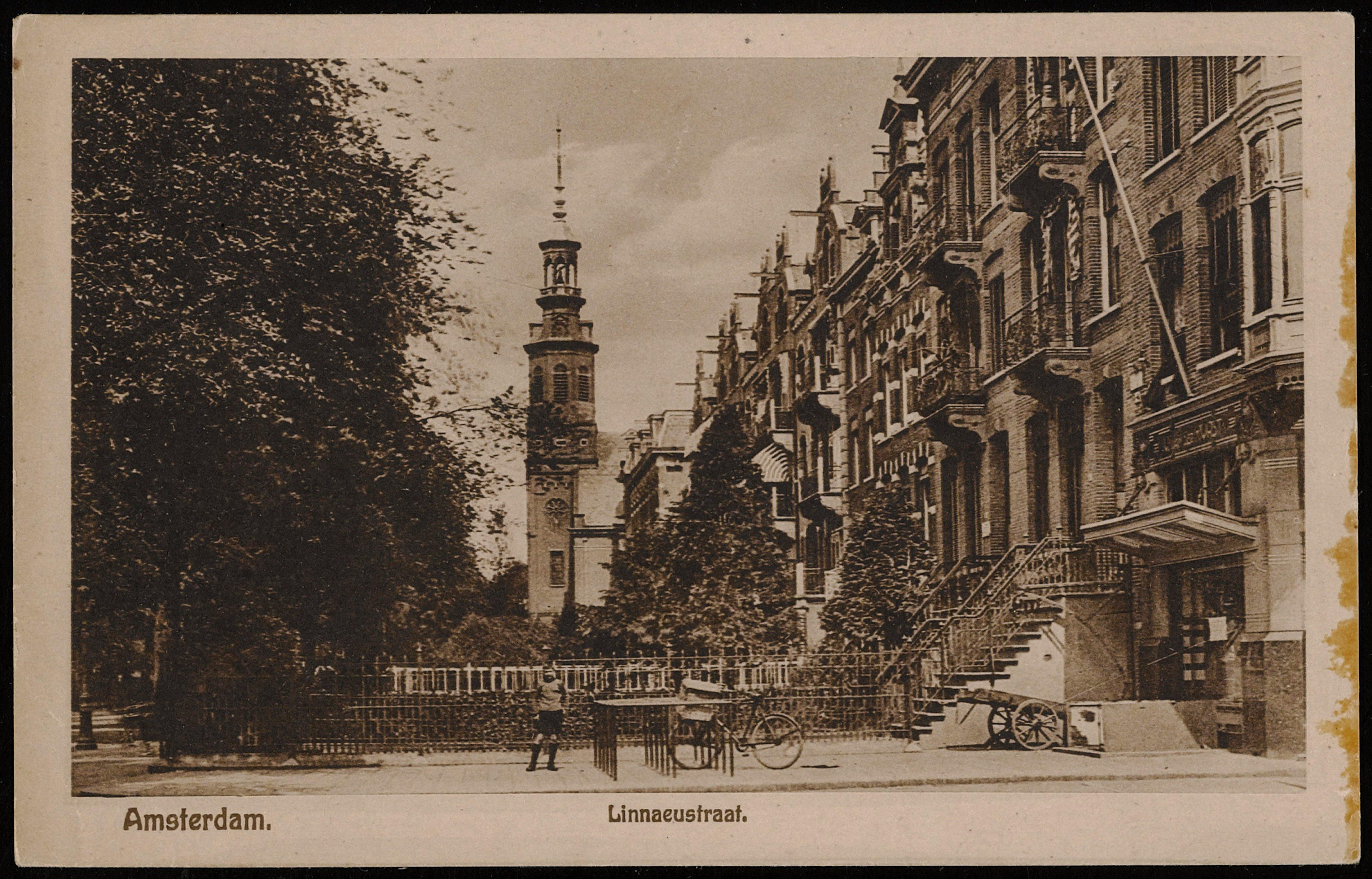 Beschrijving Linnaeusstraat hoek Wijtenbachstraat met R.K. Muiderkerk hoek Eerste van Swindenstraat Documenttype prentbriefkaart Vervaardiger Onbekend Anoniem Collectie Collectie Stadsarchief Amsterdam: prentbriefkaarten Datering 1920 Geografische naam Linnaeusstraat Inventarissen Afbeeldingsbestand PRKBB00355000015